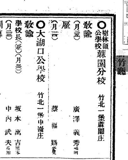 1916年(大正五年)臺灣總督府職員錄，新竹廳第222頁。